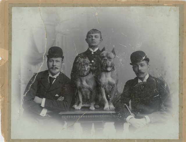 Gustav a Richard Schoeller